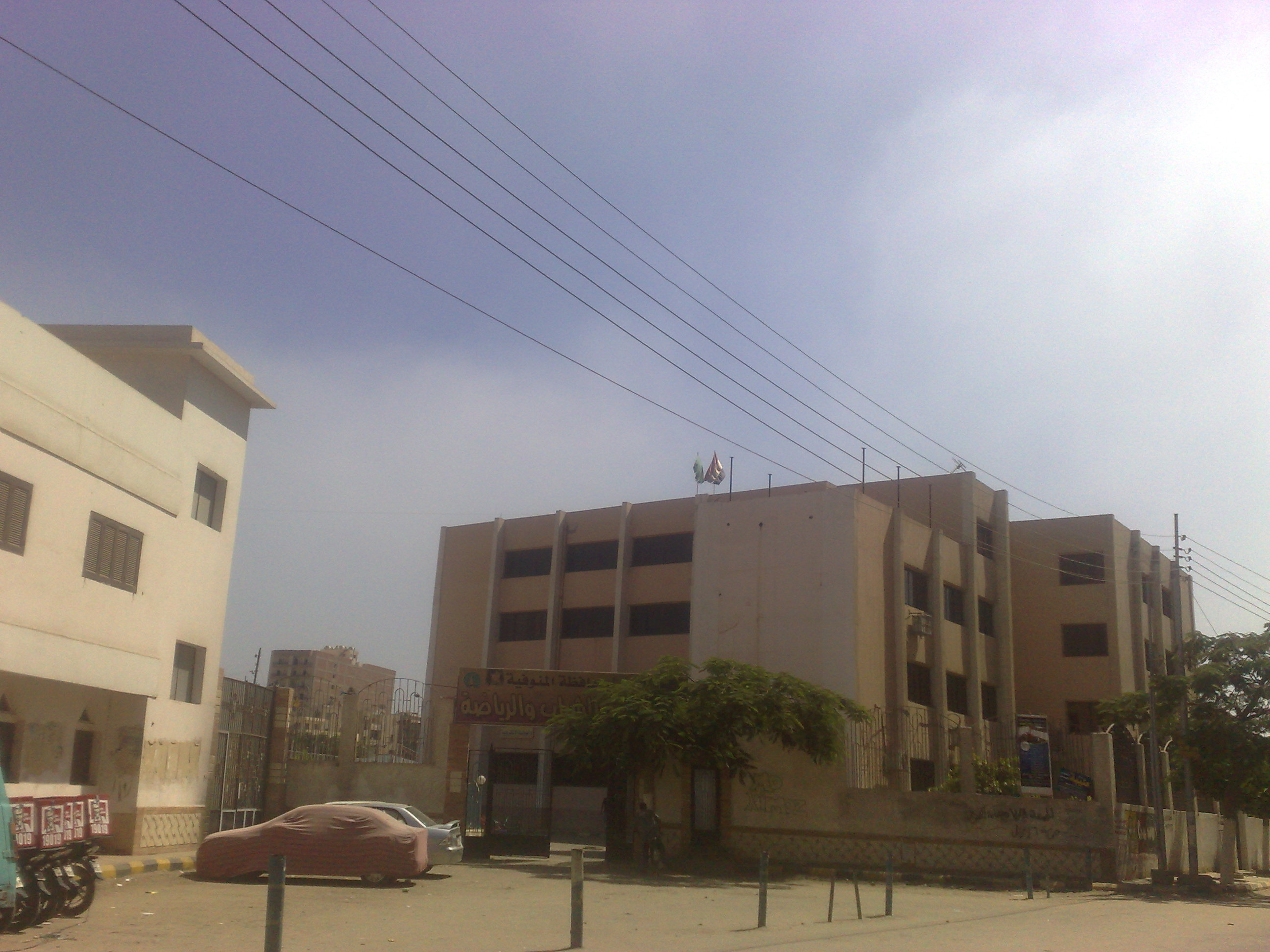 مديرية الشباب والرياضة بالمنوفية - شبين الكوم